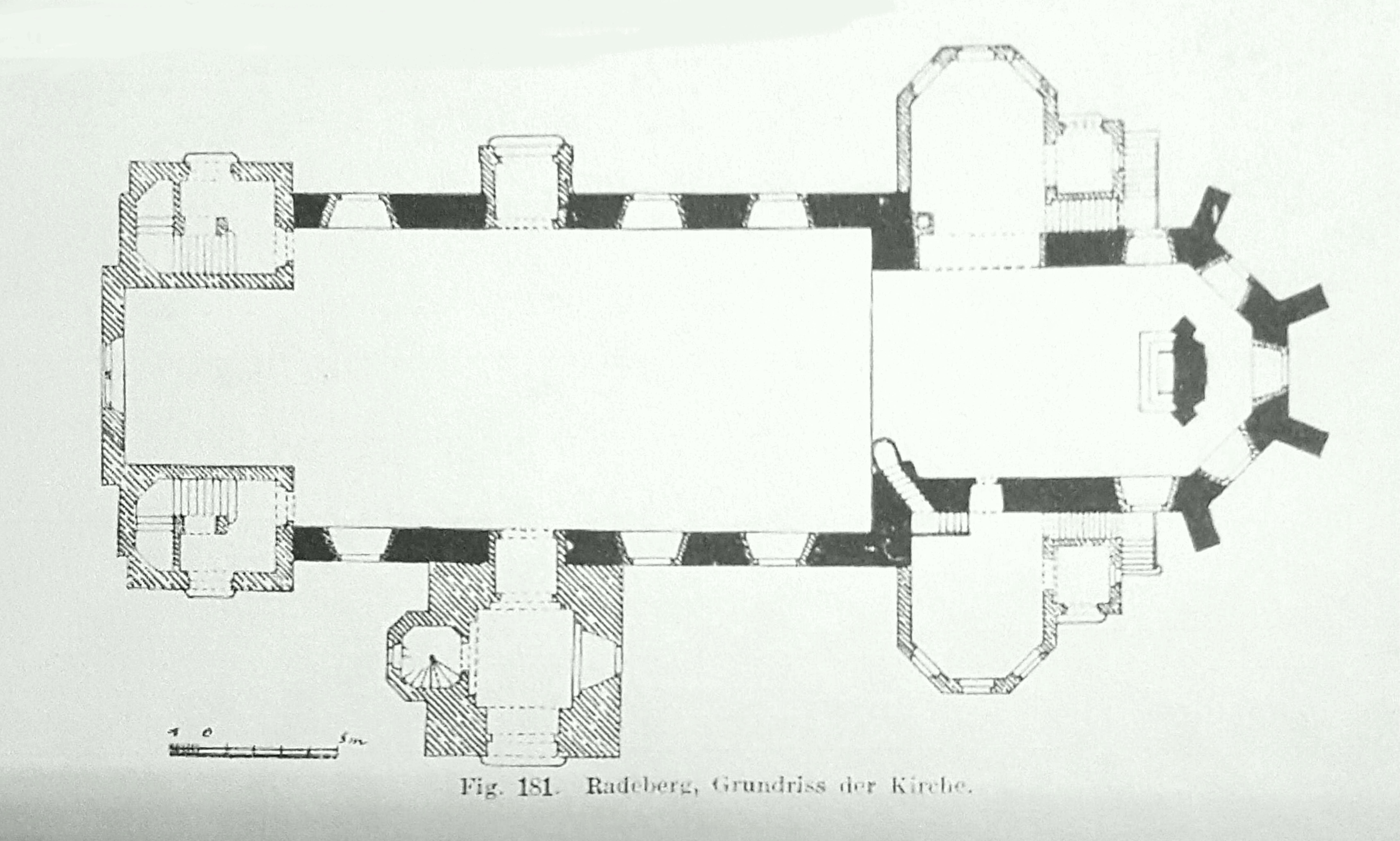 Stadtkirche Radeberg Grundriss um 1904